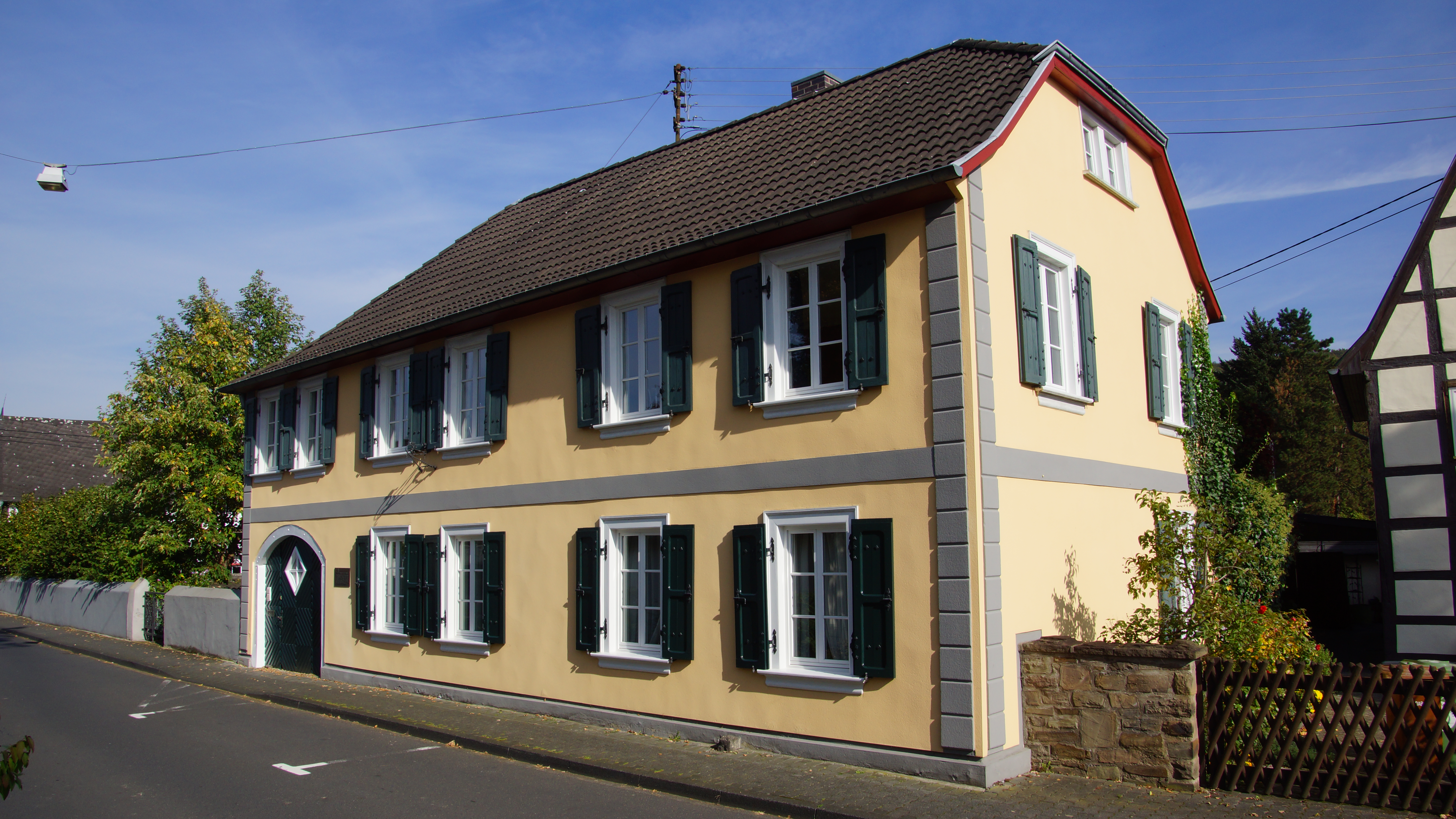 Von-Weise-Haus in Unkel-Heister, Sebastianstraße 41